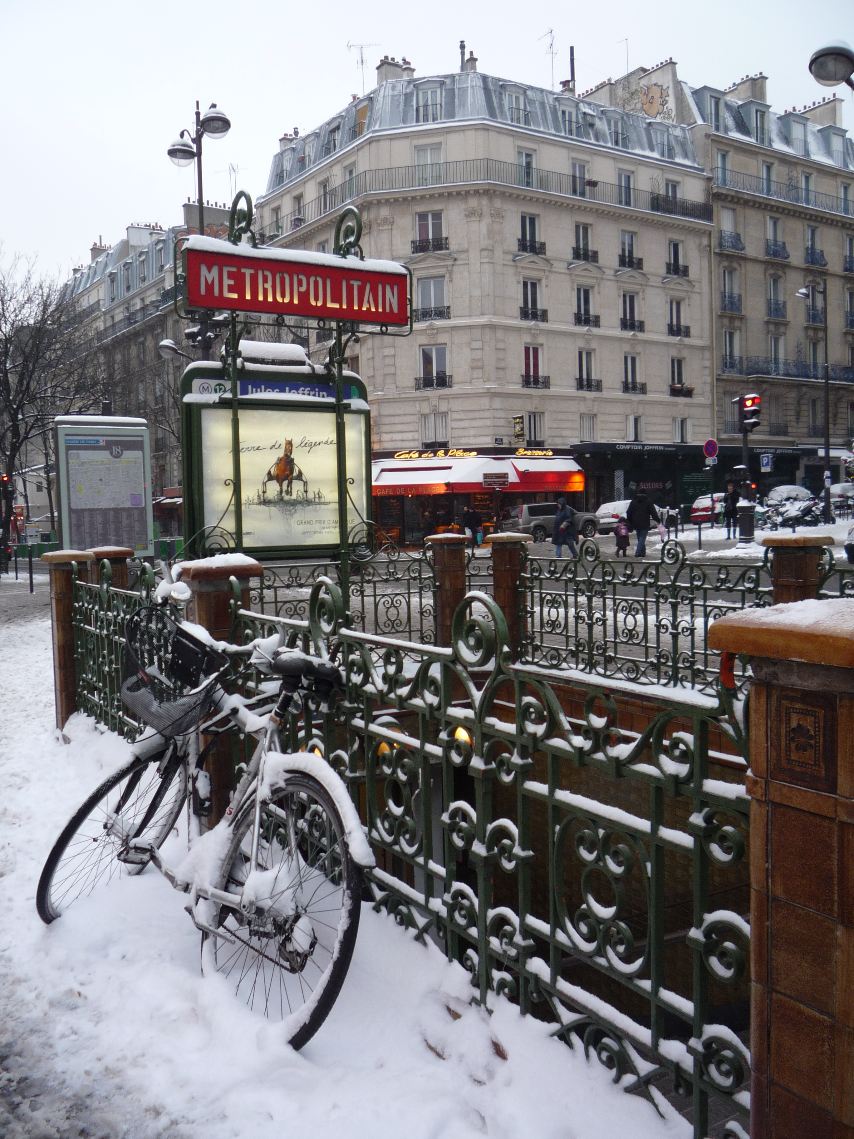 Métro Jules Joffrin, Paris, 18e arrondissement.